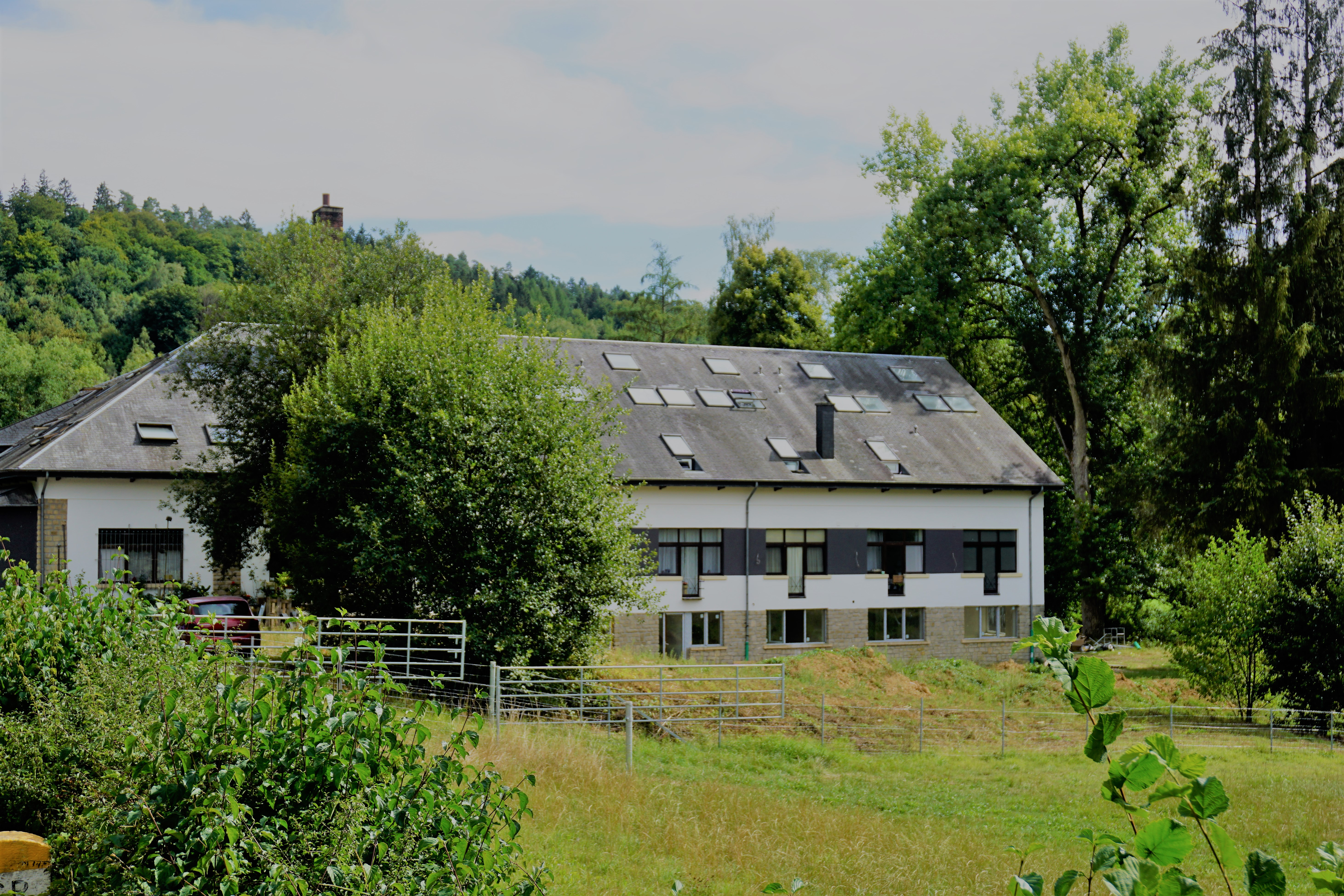 Simmerfarm, commune de Habscht. Ancienne station d'expérimentation pour plantes médicales, actuellement logements.